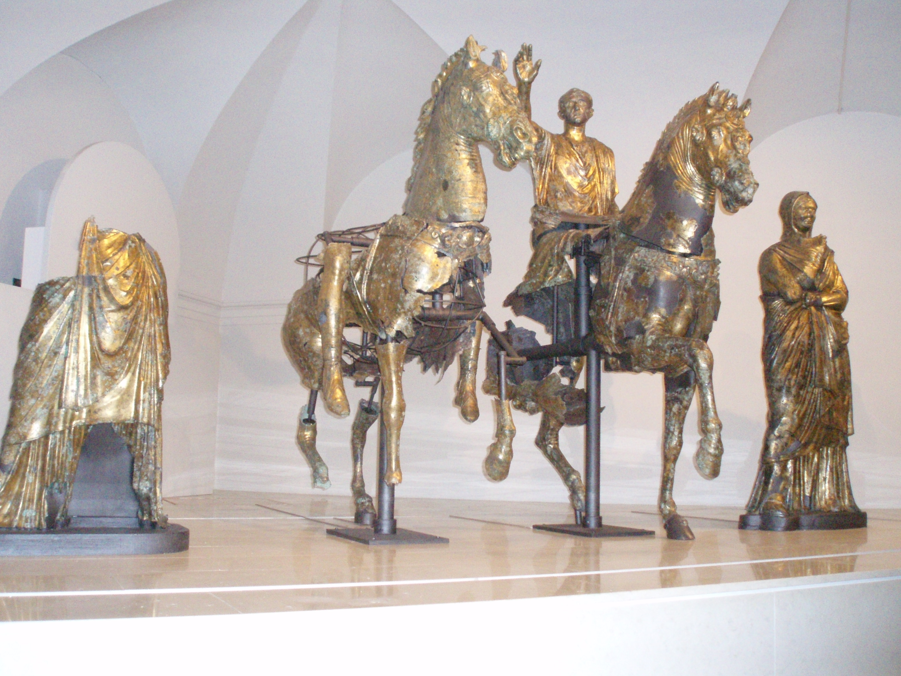 Bronzi dorati da Cartoceto di Pergola - 08